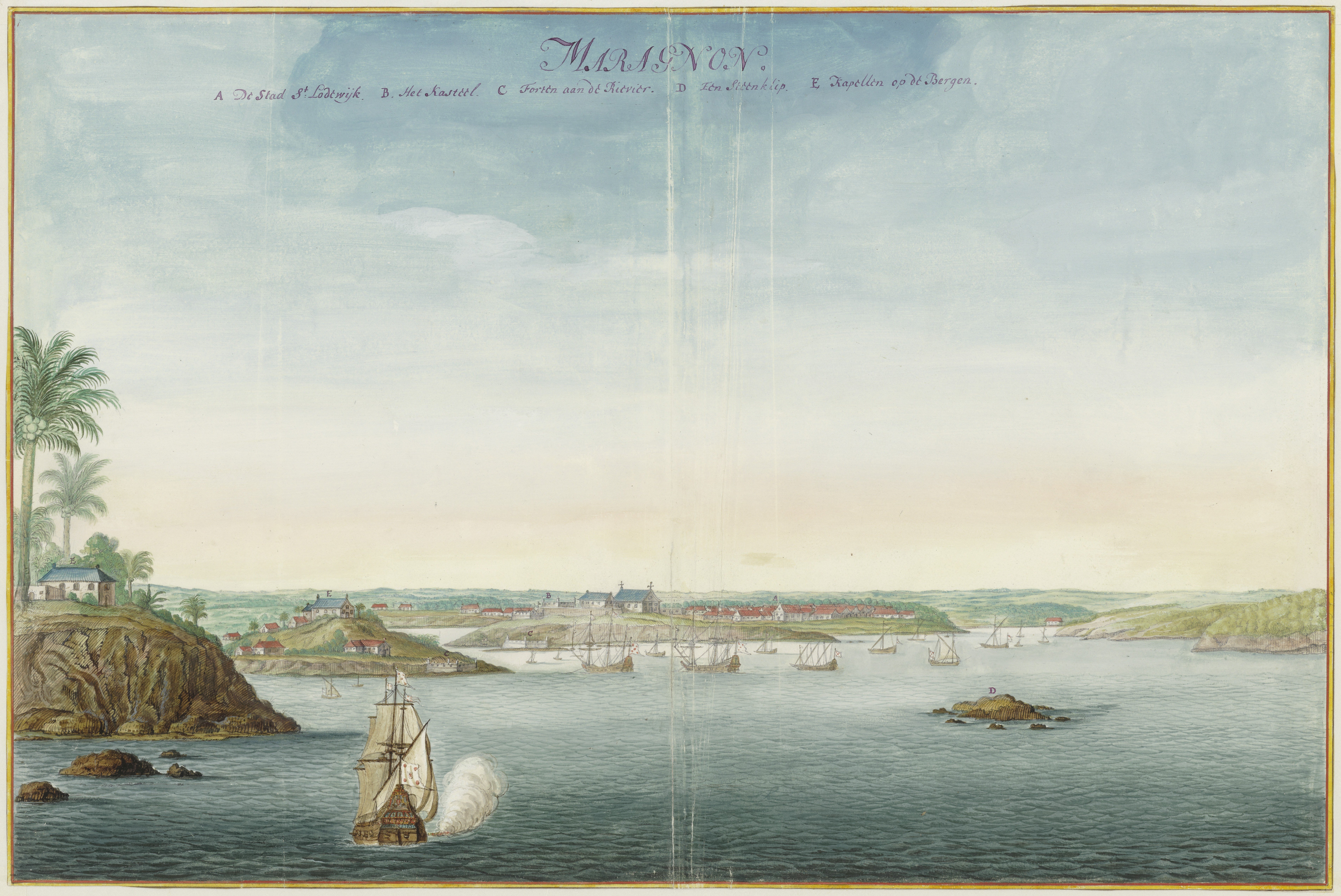 "Maragnon" Gezicht op Maragnon/Maranhão/São Luís, Brazilië